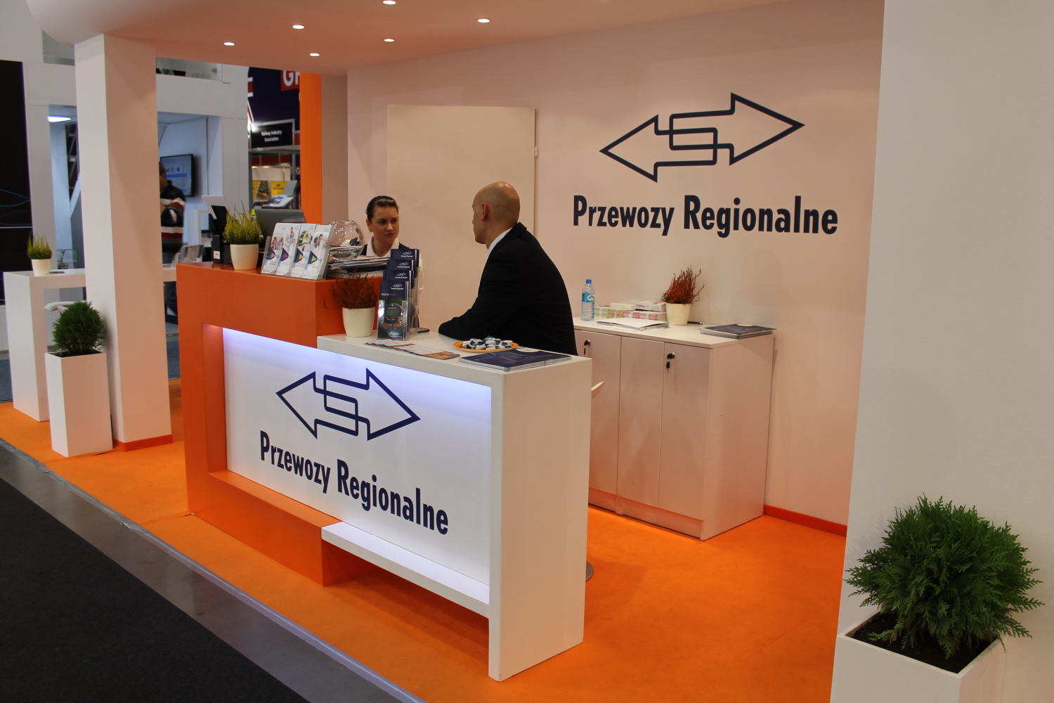 Stoisko Przewozów Regionalnych podczas targów Trako 2015. The making of this document was supported by Wikimedia Polska Association, within Wikigrant no. WG 2015-34. English | polski | +/−